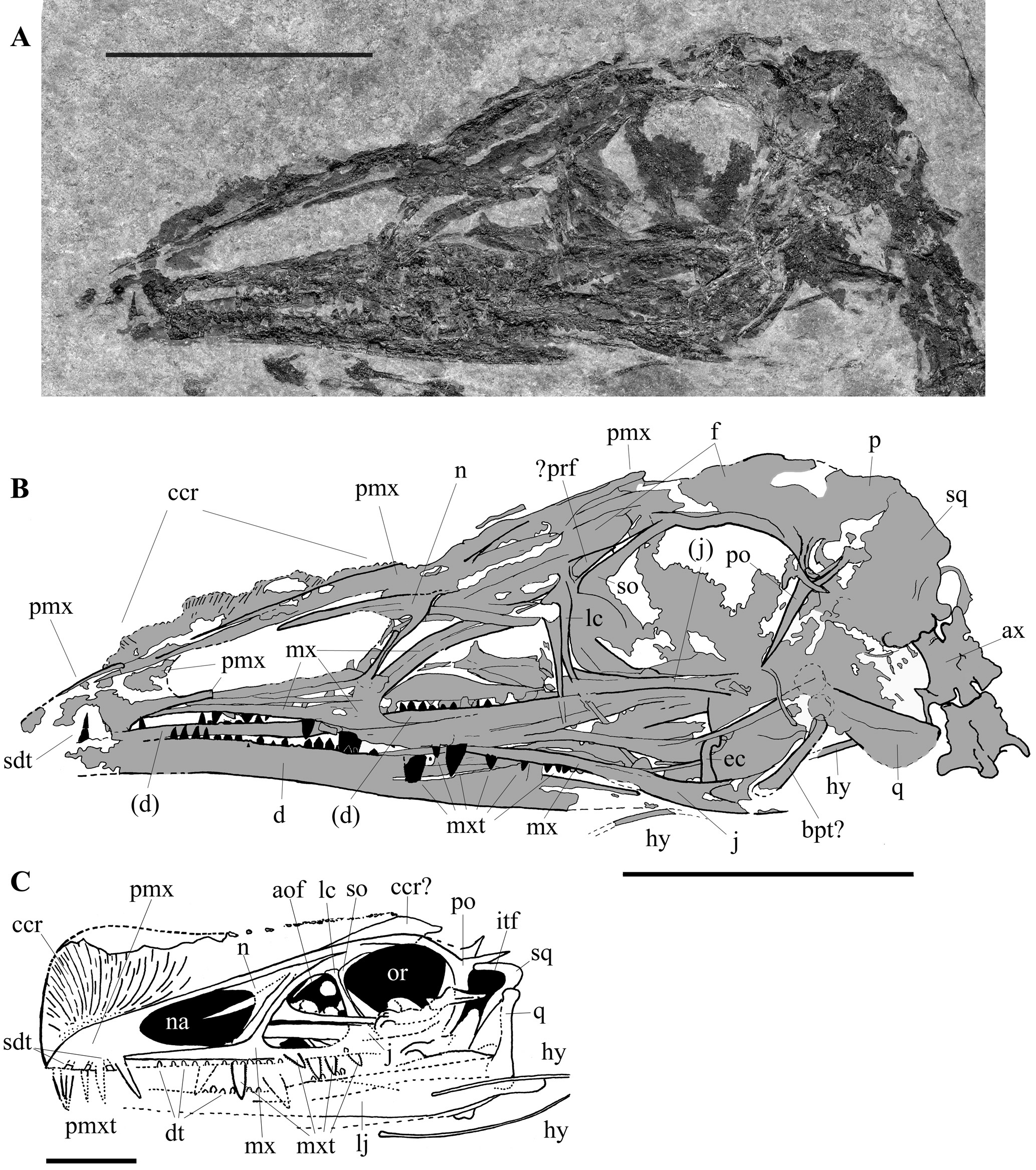 Austriadactylus cristatus skull and lower jaw from Carnic Prealps (A, B) and illustration of holotype (C).